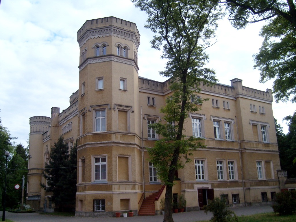 Jabłonowo Pomorskie - Zespół pałacowo-parkowy; neogotycki pałac Narzymskich, od 1933 dom generalny Zgromadzenia Sióstr Pasterek od Opatrzności Bożej, zbudowany w latach 1854-59 dla Stefana Narzymskiego prawdopodobnie wg projektu F. A. Stülera.